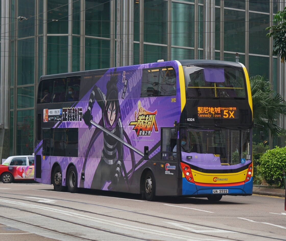 中文（香港）: 城巴5X線，正由金鐘道駛入德輔道中